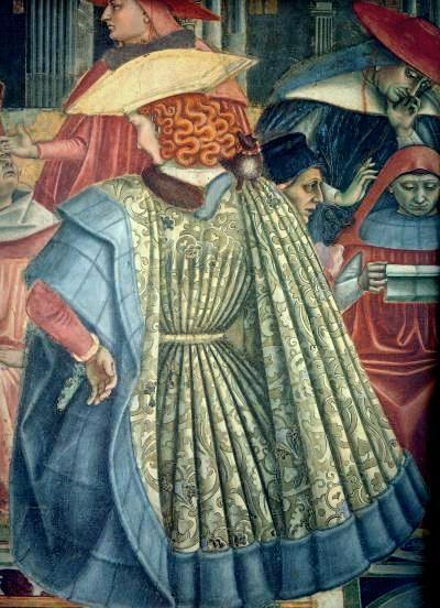 Santa maria della scala fresco detail domenico di bartolo